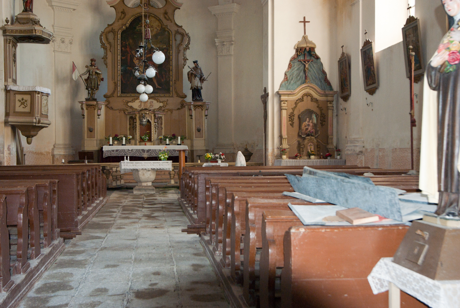 Kostel sv. Bartoloměje (Přebuz), Přebuz